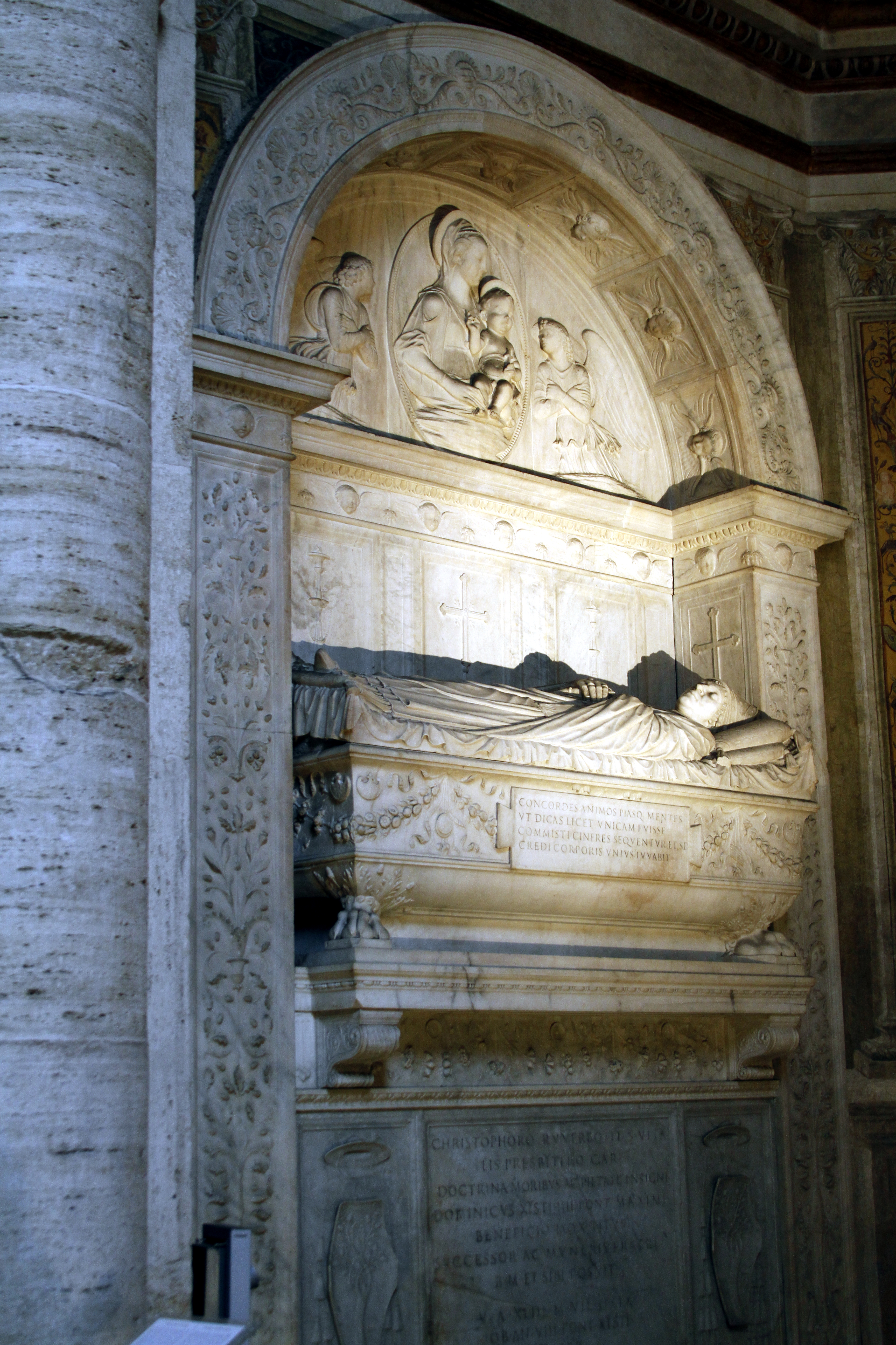 Santa Maria del Popolo - Rome